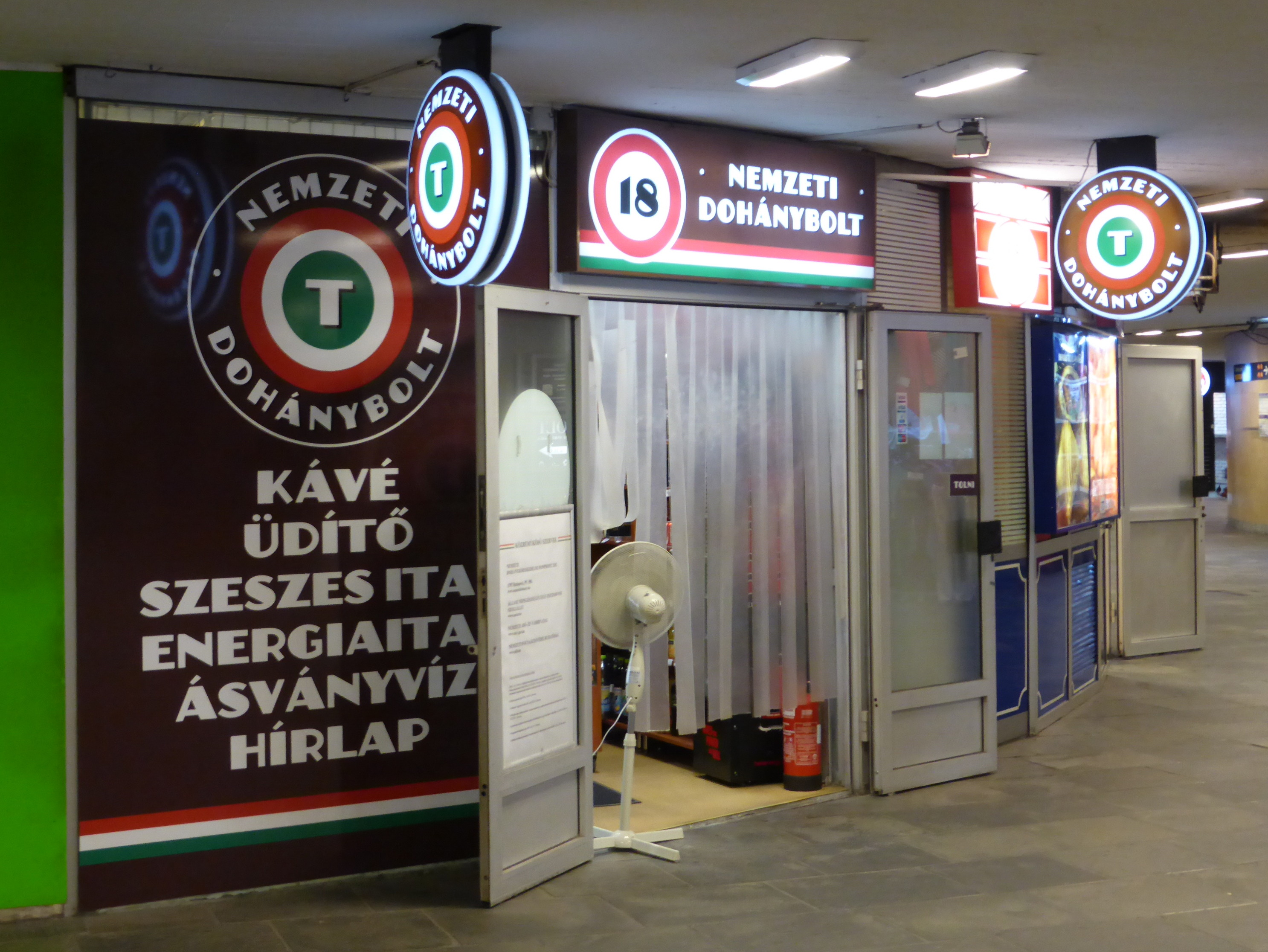 Tabakladen in der Fußgängerunterführung am Kálvin tér in Budapest